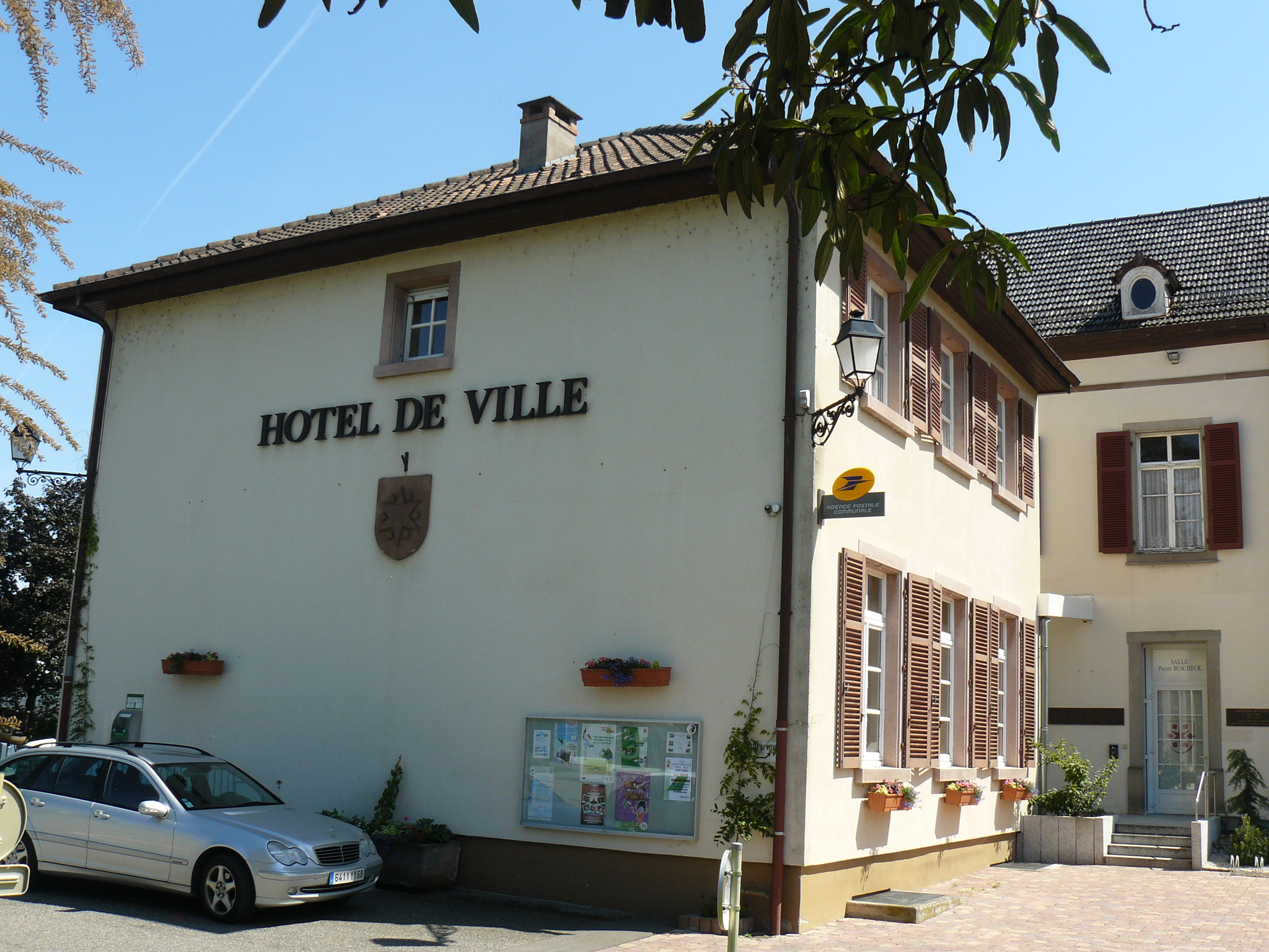 Hôtel de ville